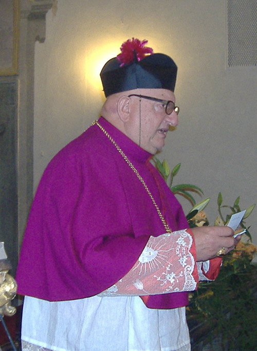 Father Renzo Francalanci - Prato - Italy